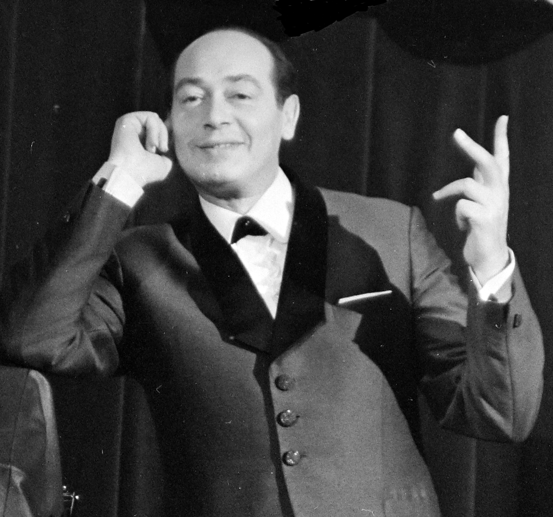 Komlós János magyar újságíró, kabaréigazgató, humorista, konferanszié, író, kritikus, műfordító, dramaturg.